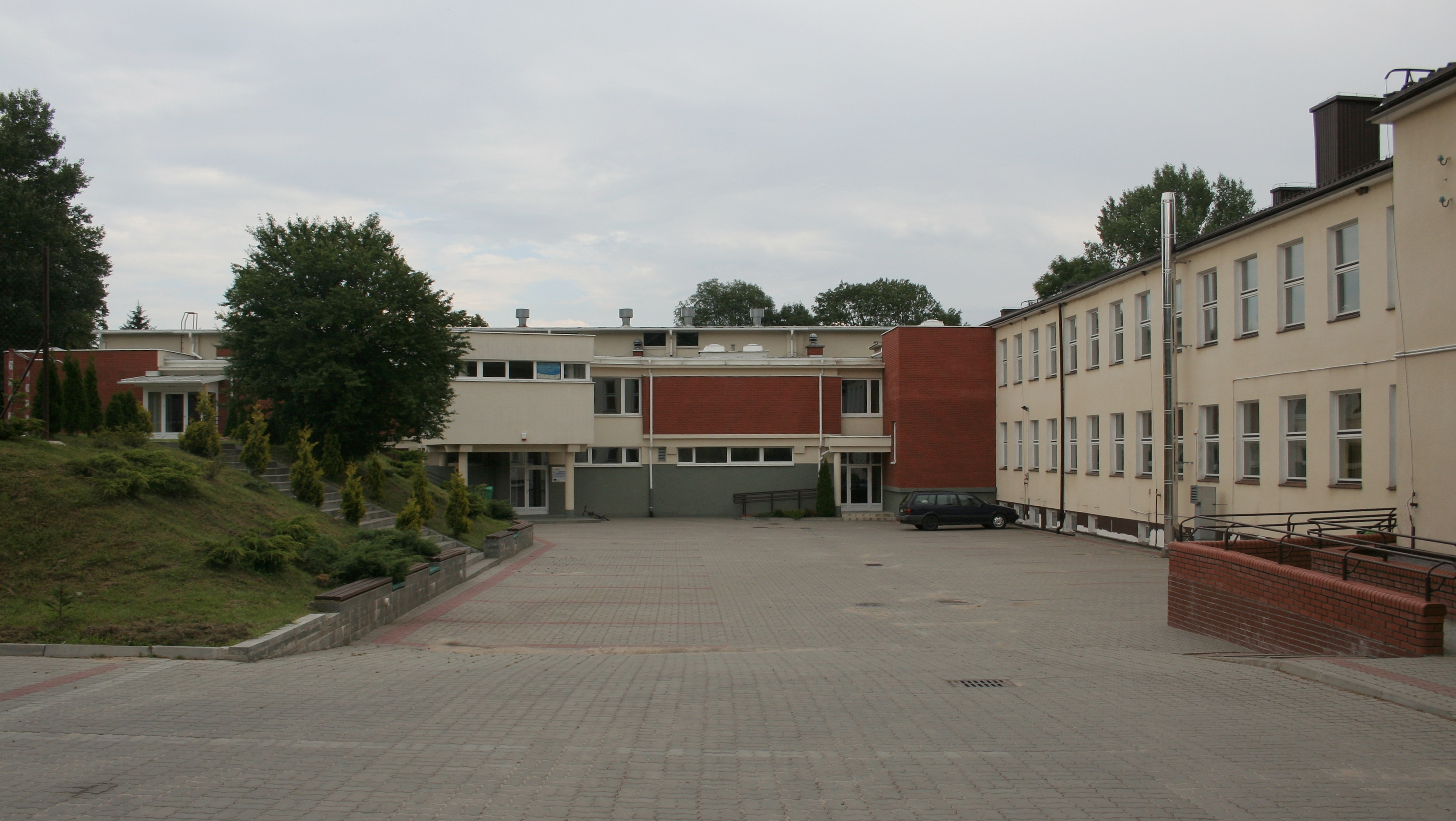 Mielnik, woj. podlaskie - zespół szkół